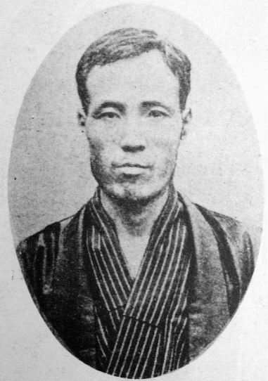 a Japanese man 与謝野鉄幹 (Tekkan Yosano)